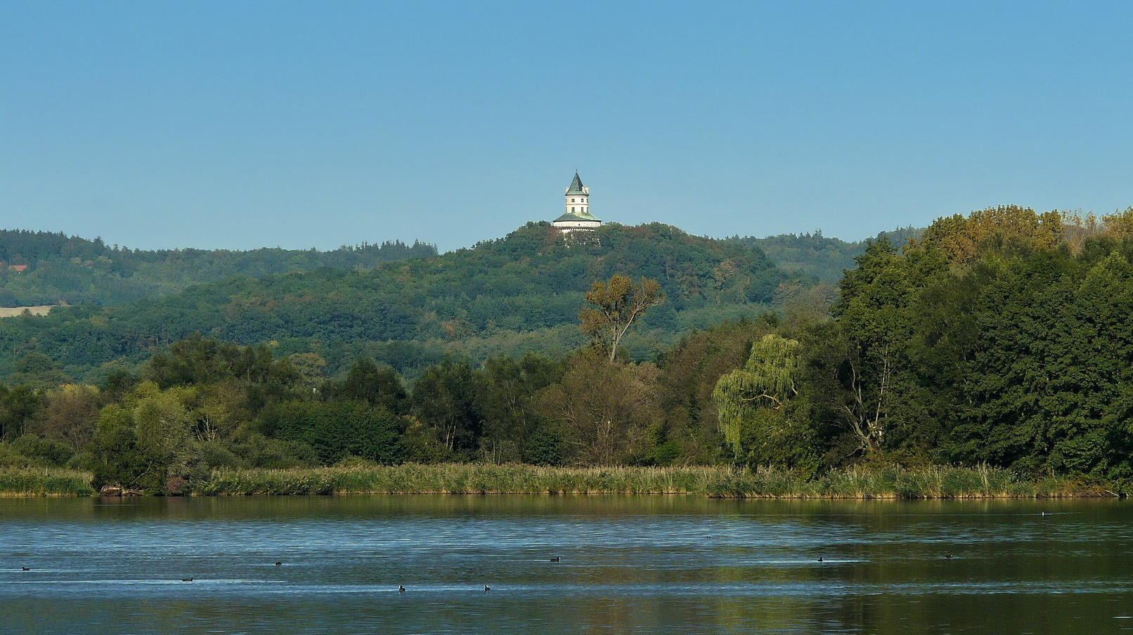 Humprecht nad Červenským rybníkem